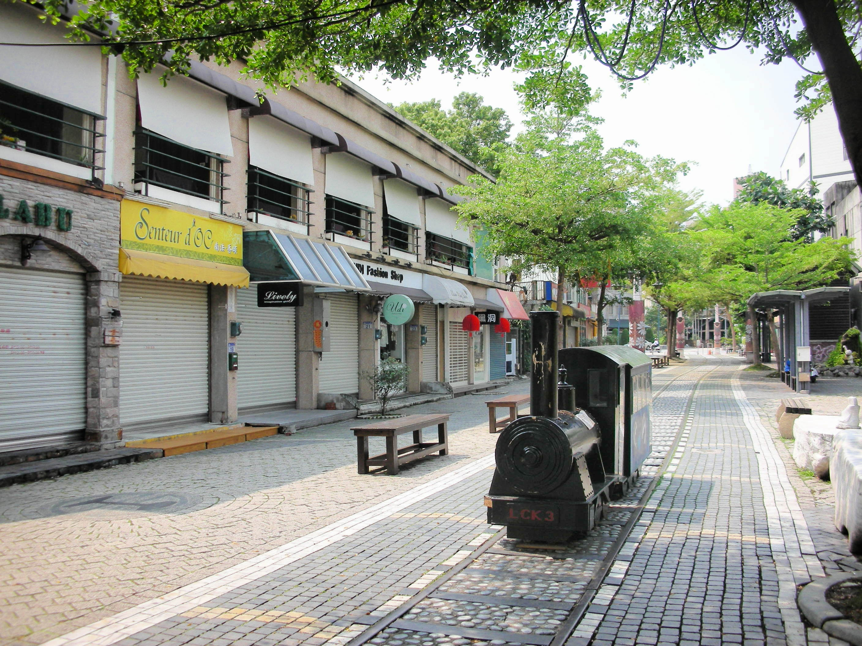 花蓮舊鐵道商圈